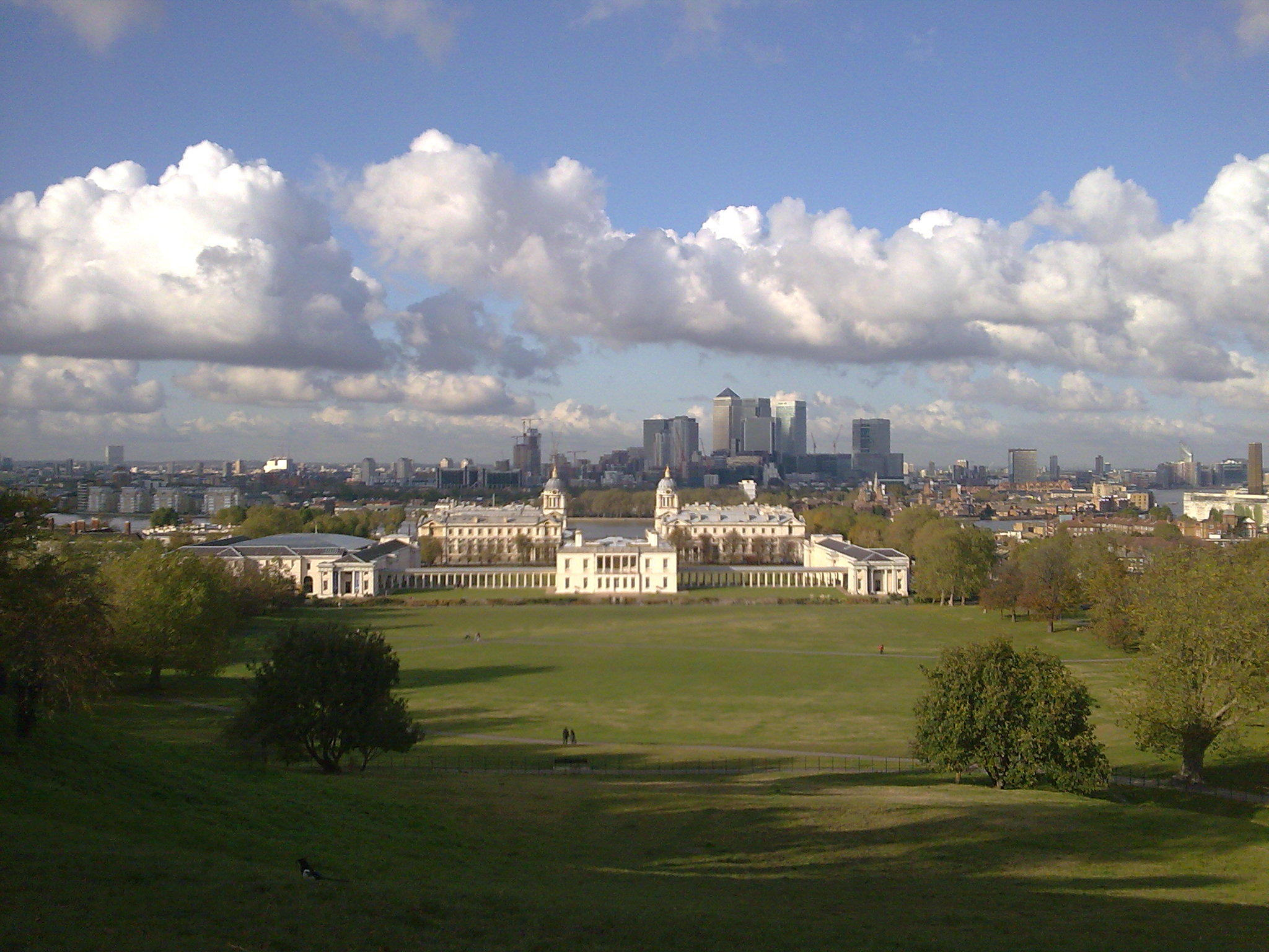 Grinič